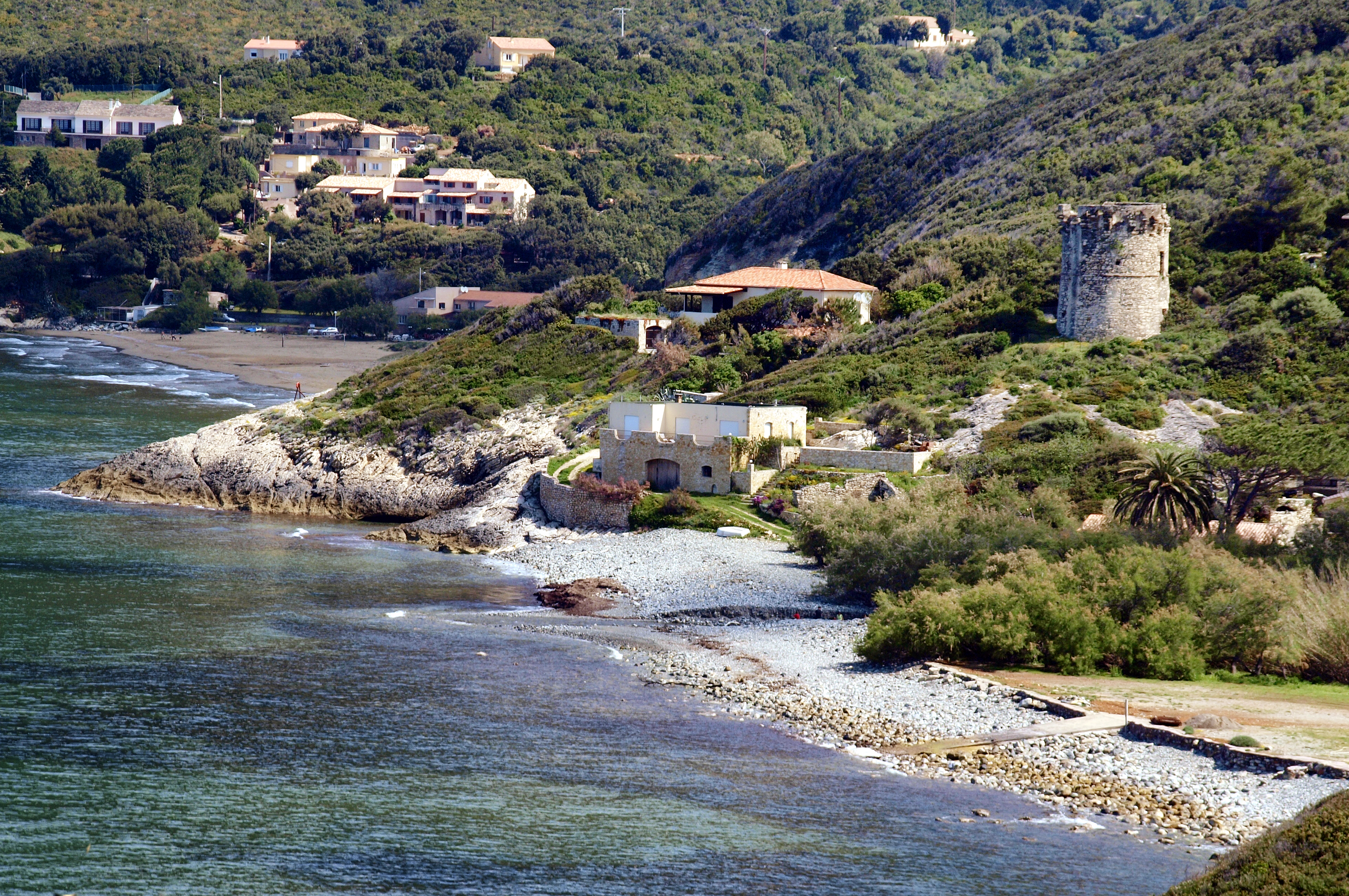 Farinole, Cap Corse - La marine de Farinole avec sa tour génoise, inscrite MH, et la plage de galets